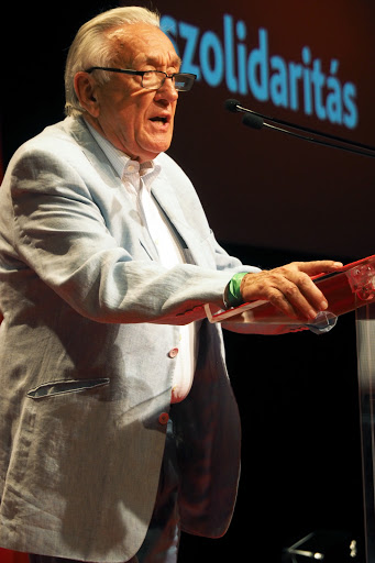 Kovács László az MSZP kongresszusán (2014)